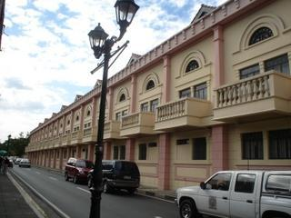 Richard Relucio